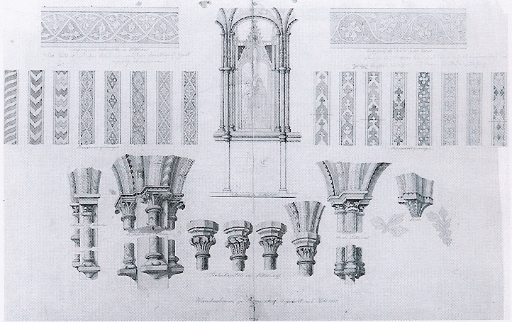 Christian Hohe: Wandmalereien der Georgskapelle, Reinzeichnung 1845